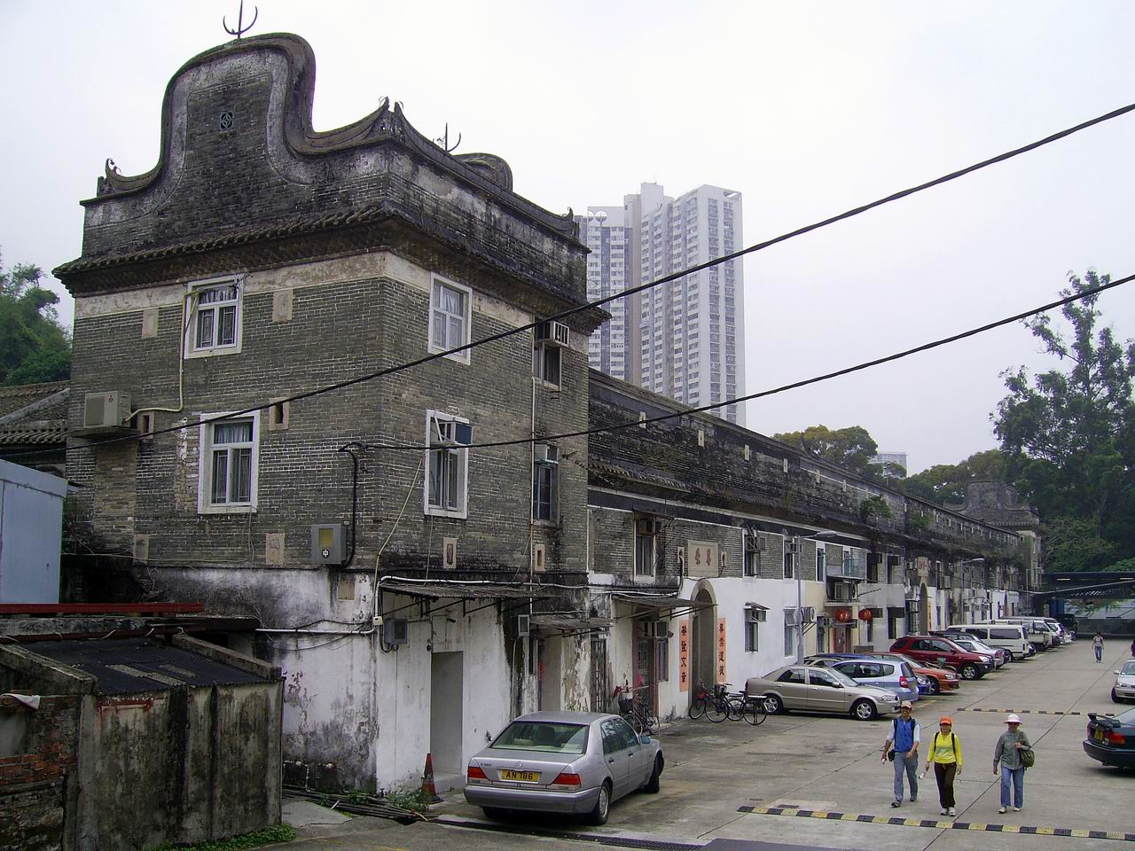 曾大屋三層角樓碉堡